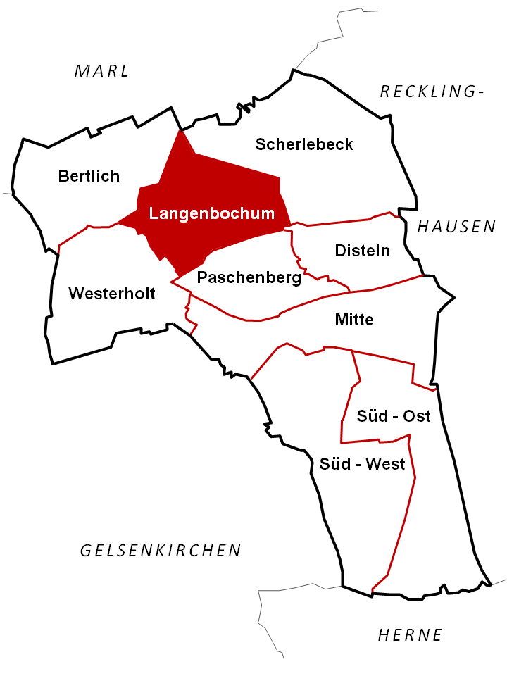 Stadtteilkarte, Langenbochum - Herten, Nordrhein-Westfalen, Deutschland